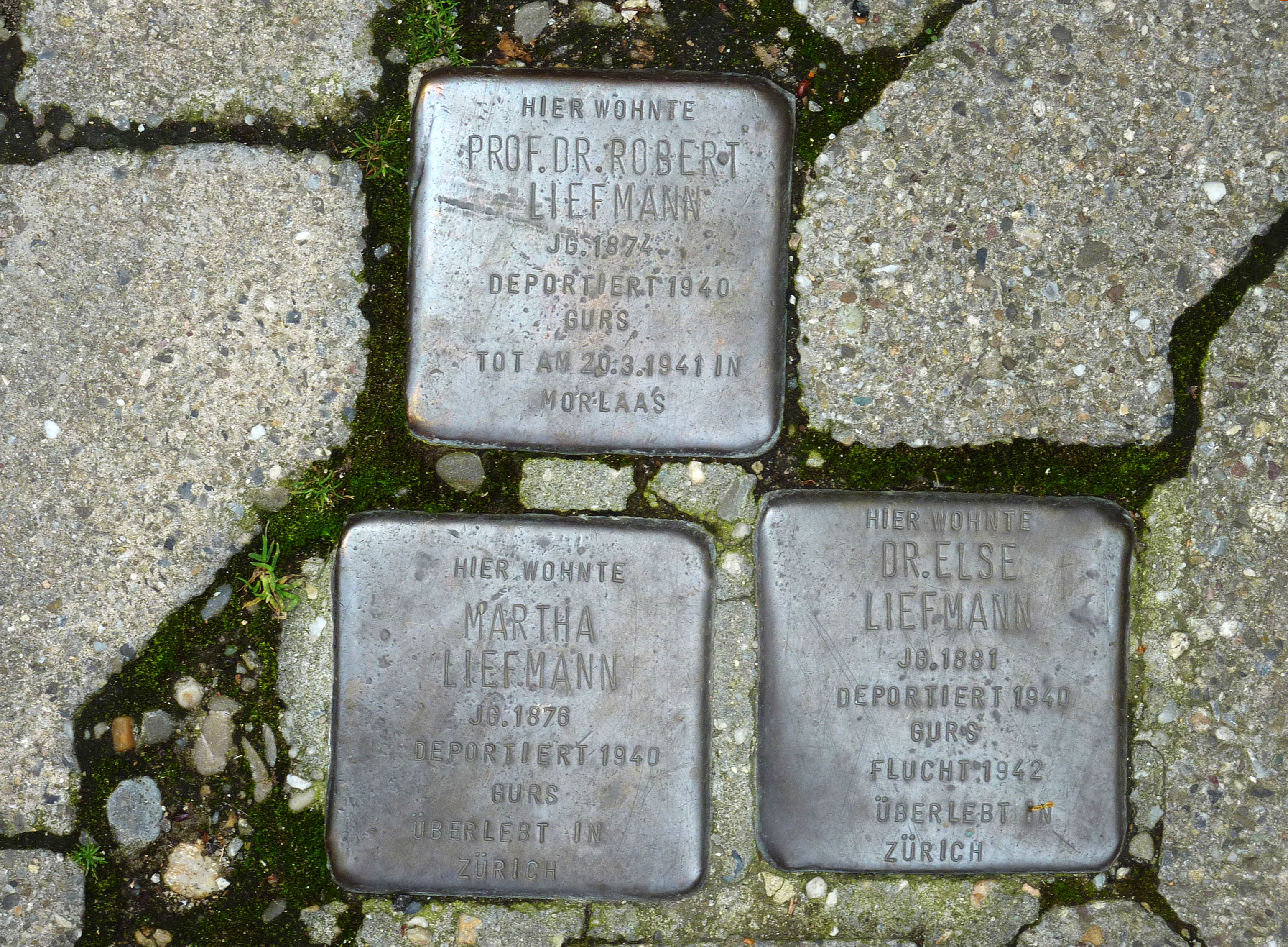 Stolpersteine für Prof. Dr. Robert Liefmann, Martha Liefmann und Dr. Else Liefmann vor dem Haus Goethestraße 33, Freiburg